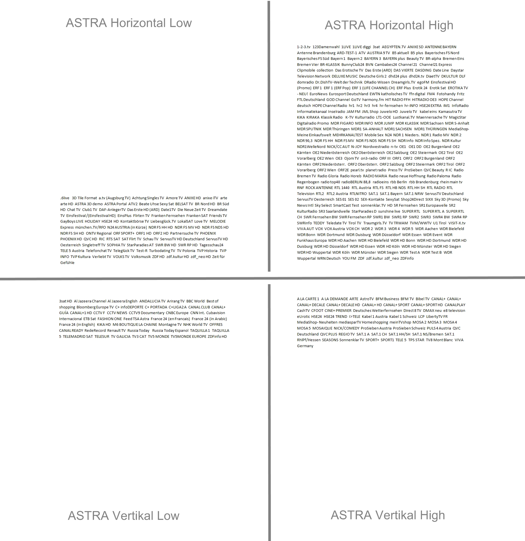 Astra Programmverteilung auf den verschiedenen Polarisationen.